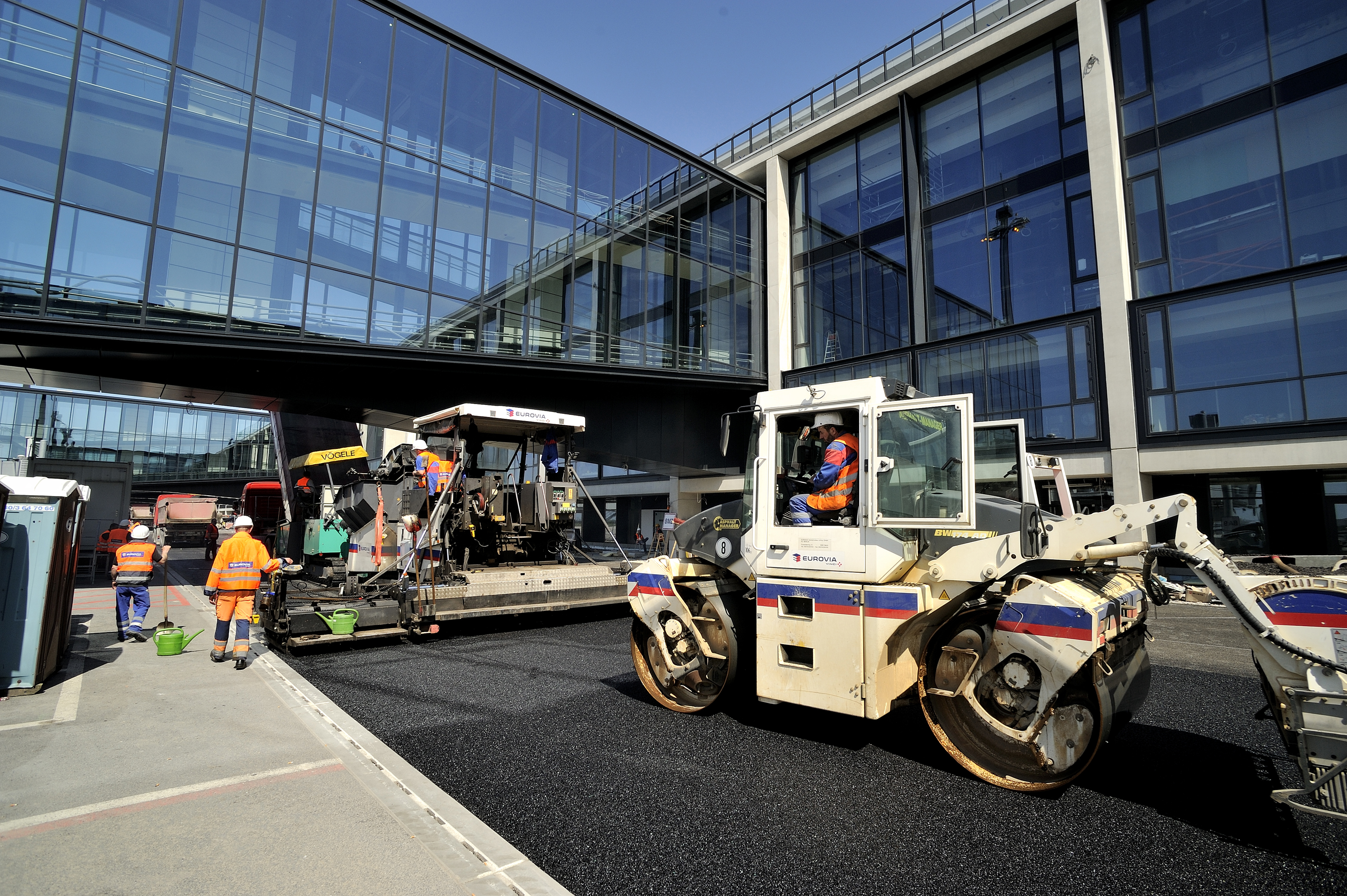 Asphaltarbeiten am Hauptstadtflughafen BER